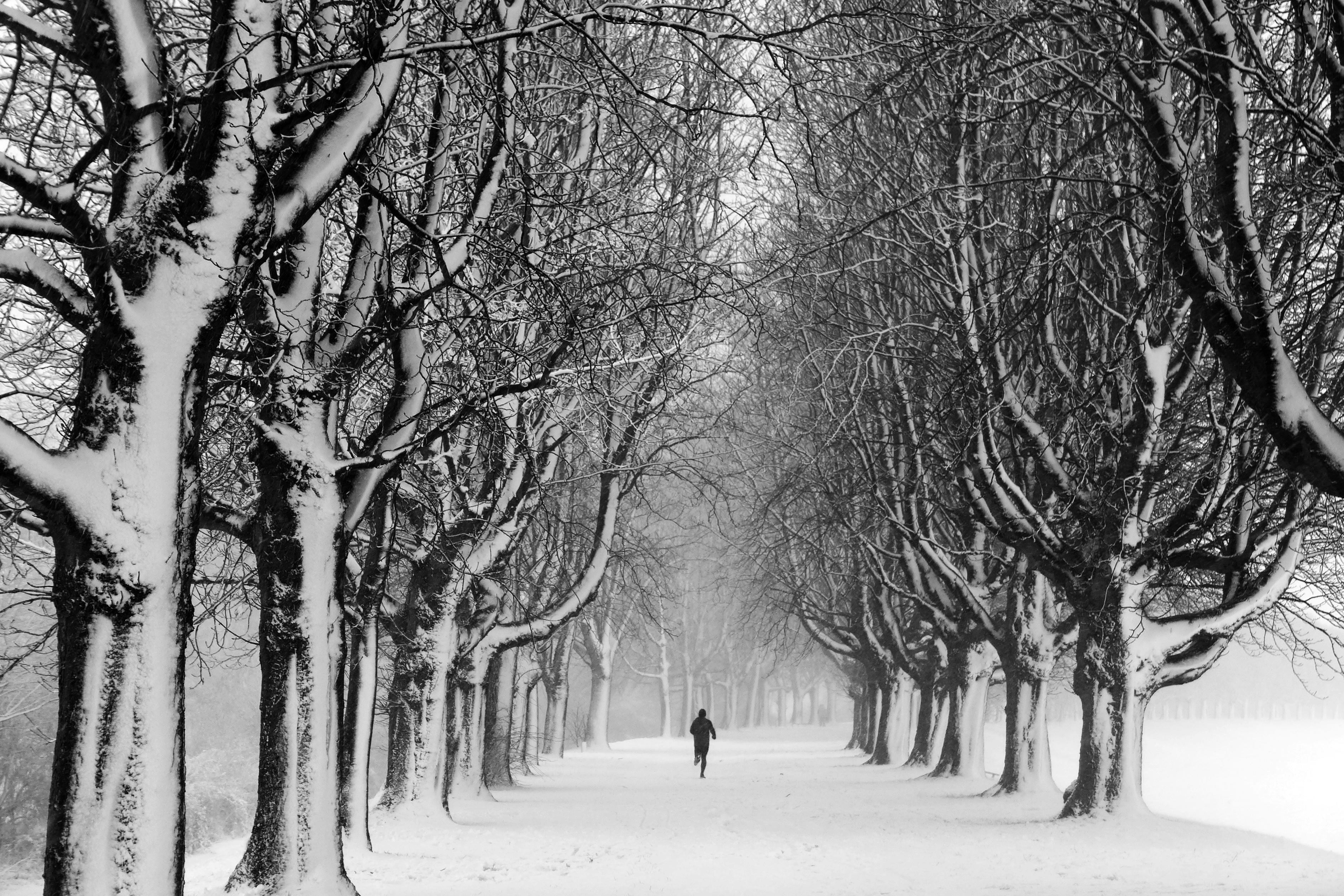 Rheinalee im Winter - Neuss Gnadental